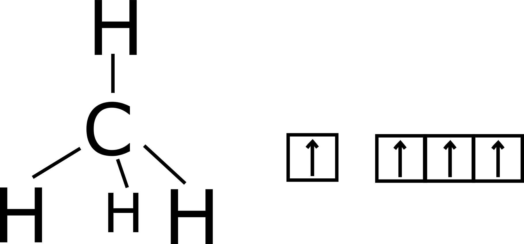 Hybridizácia sp3